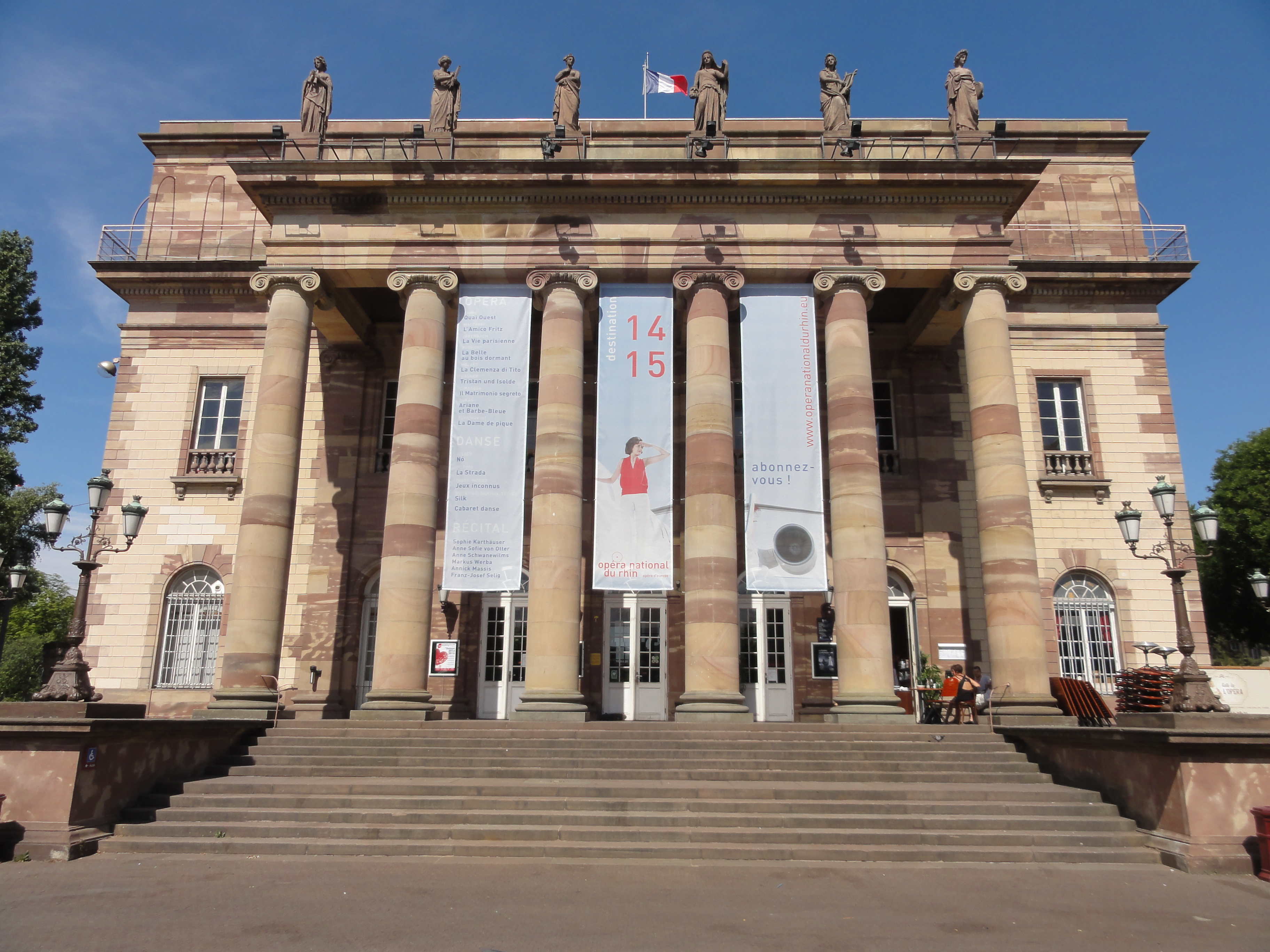 Alsace, Bas-Rhin, Strasbourg, Théâtre municipal (XIXe), actuellement Opéra du Rhin, 19 place Broglie.